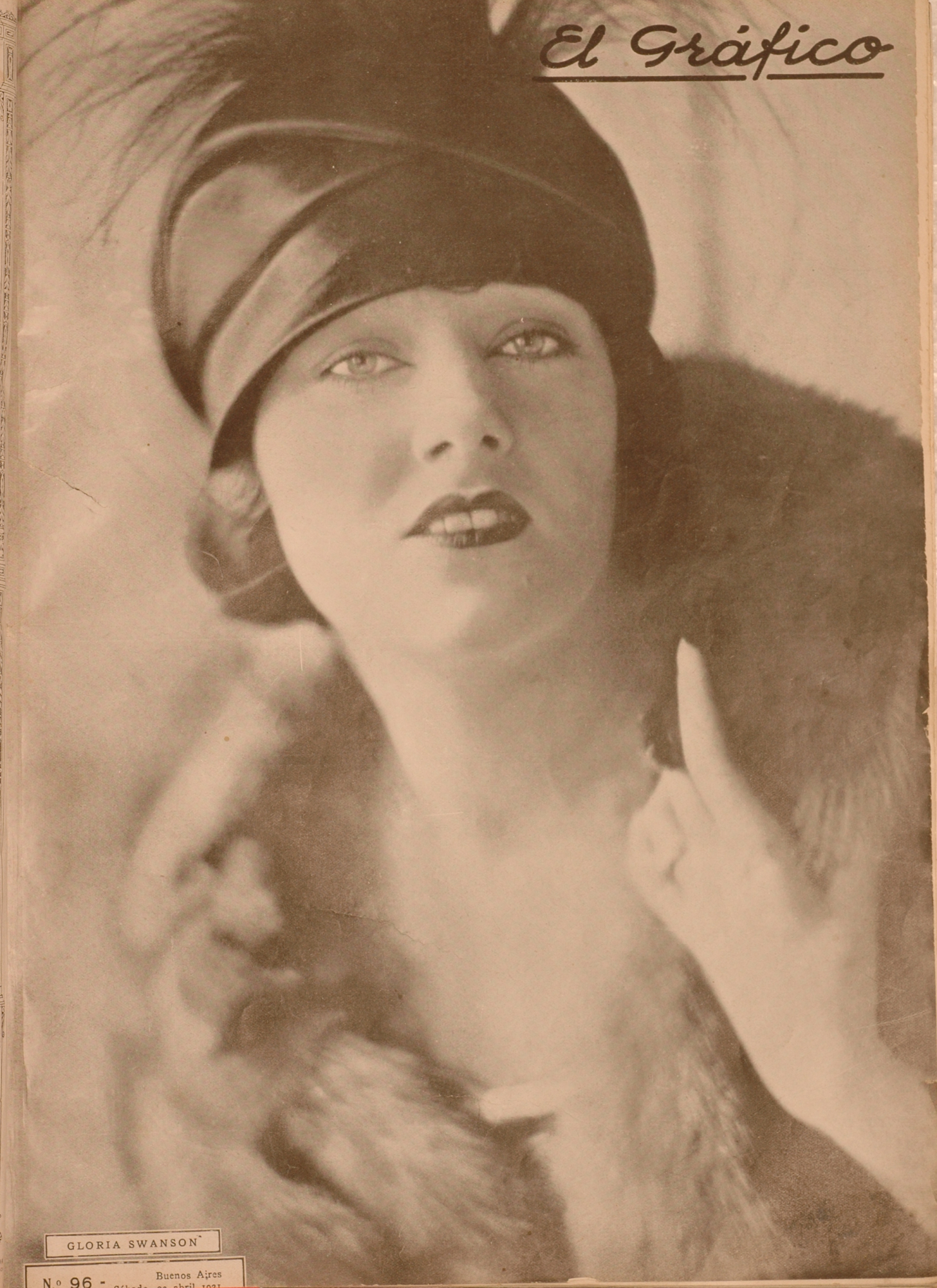 El Grafico del 23 de Abril de 1921. Edicion 96